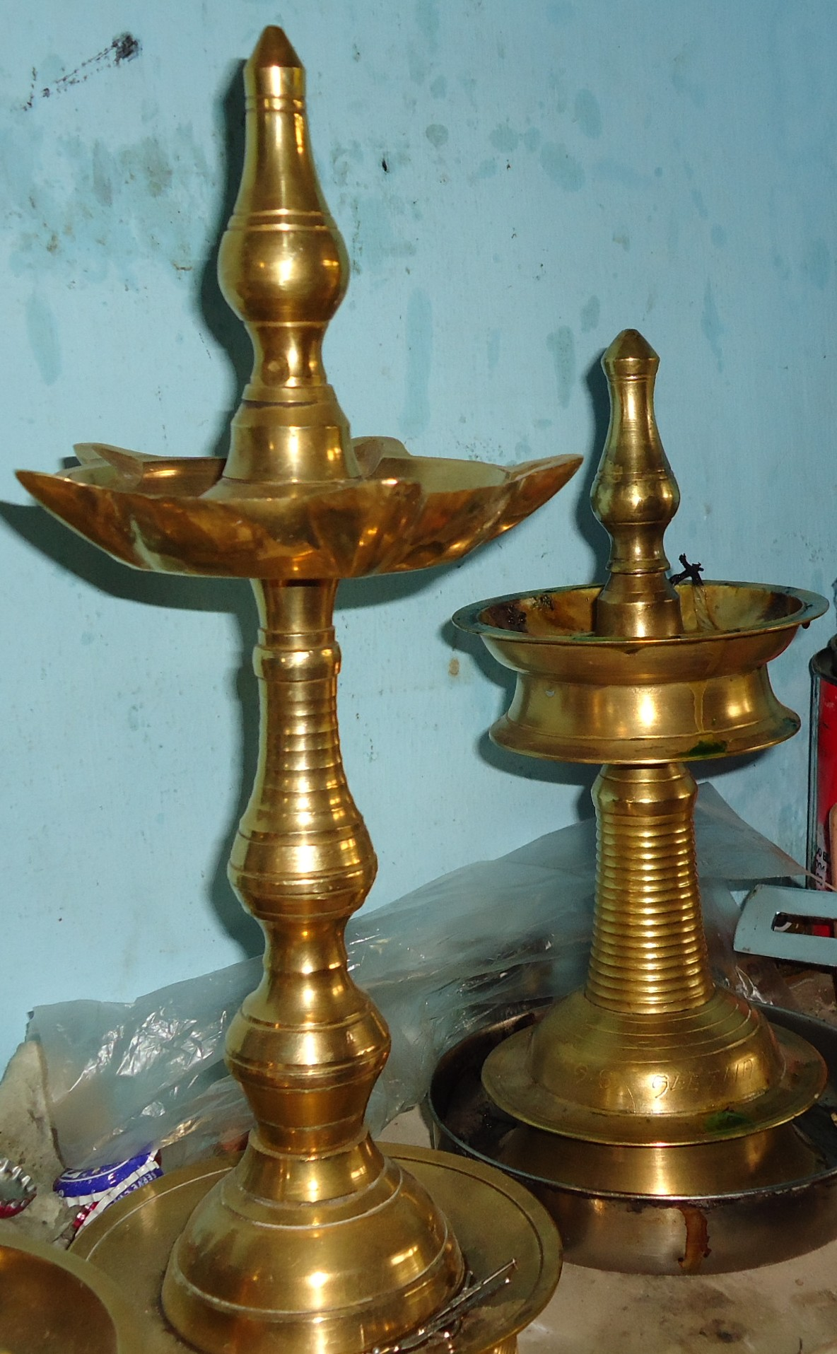 നിലവിളക്ക്